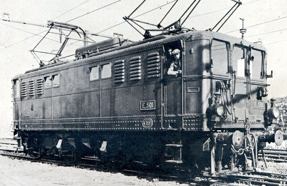 E 501 des CFM en gare de Casablanca